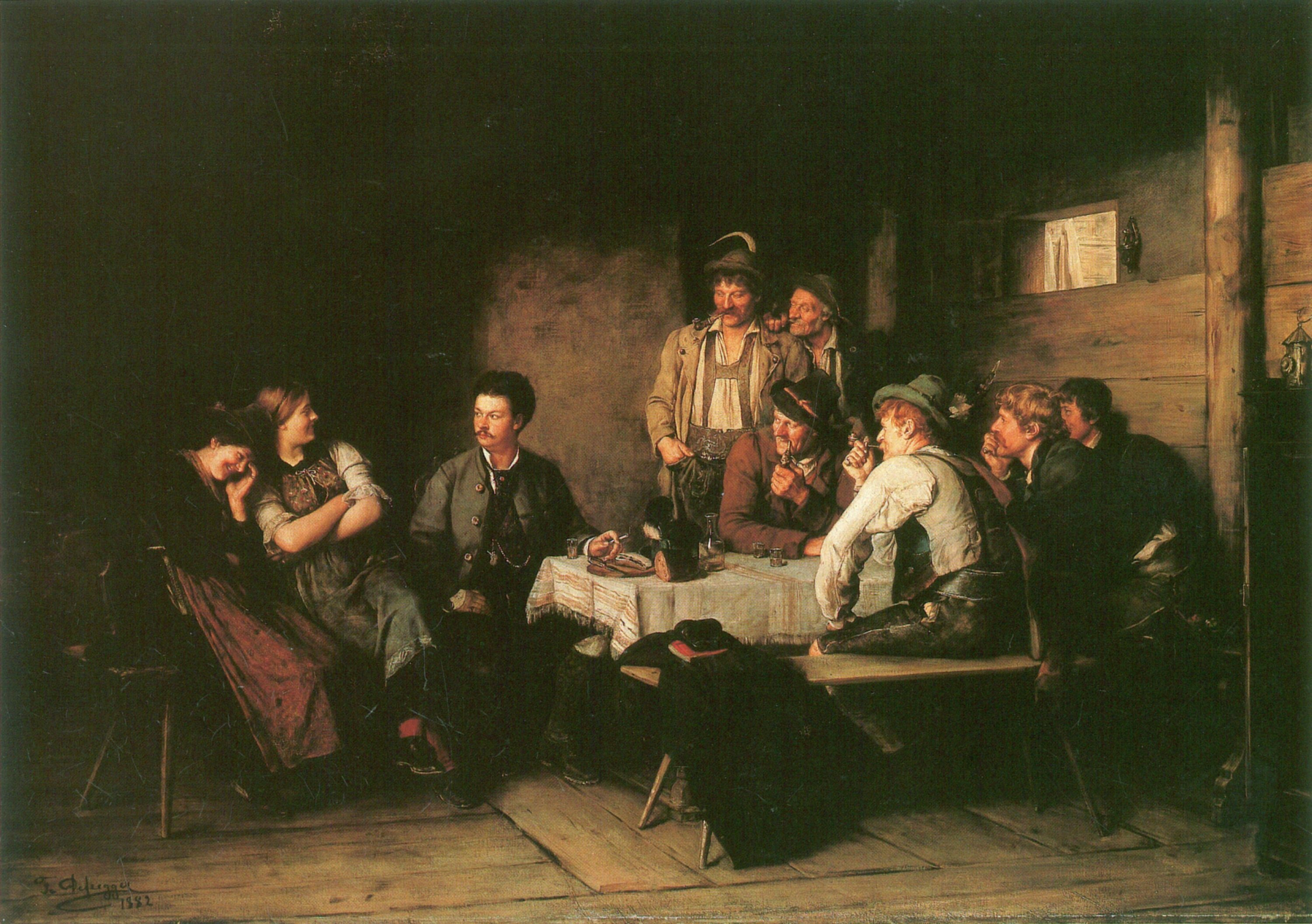 Der Salontiroler